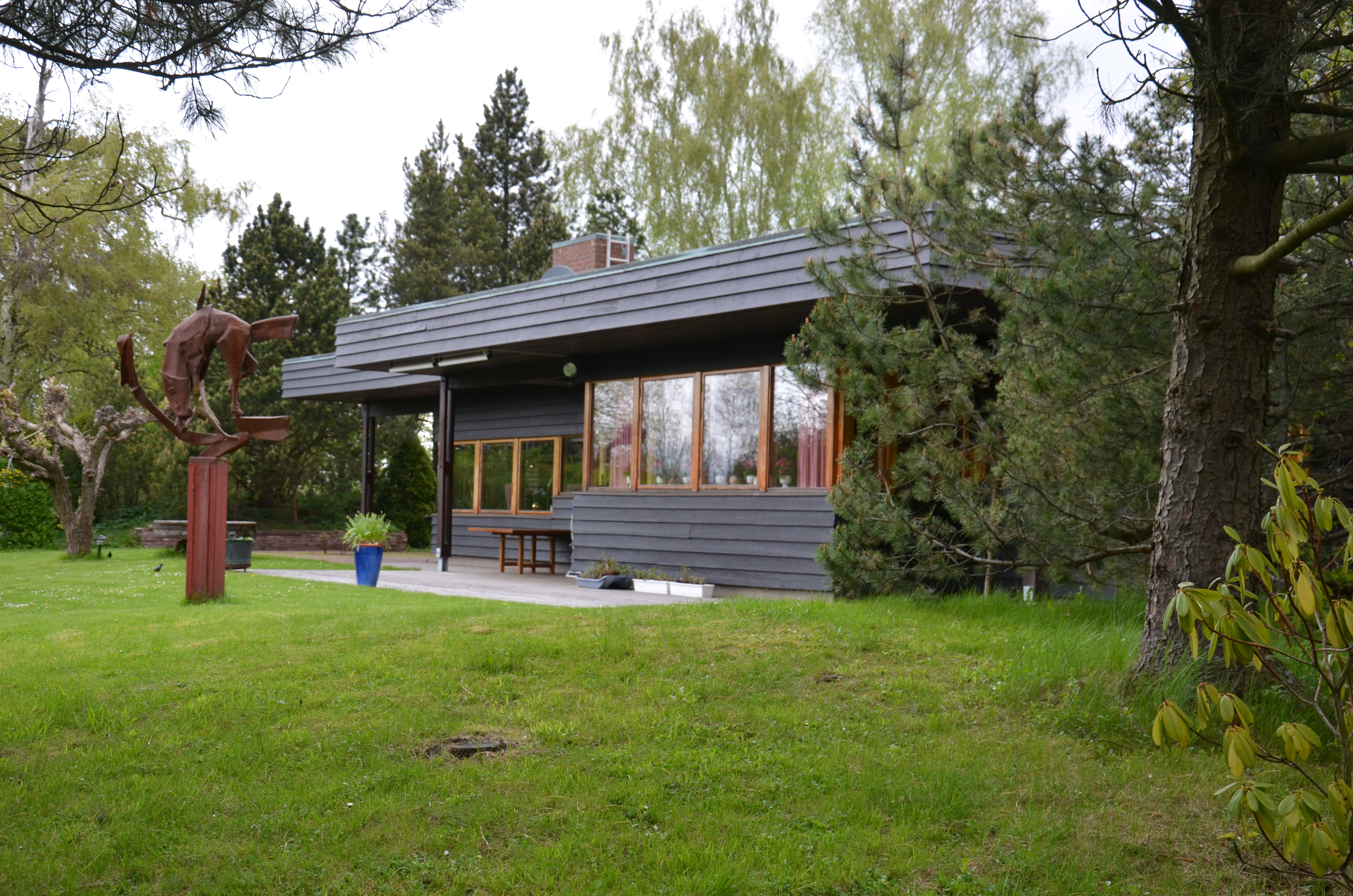 NU64 house, Nordengatan 19 in Norrköping. Architects: Magnus Ahlgren, Sven Silow and Torbjörn Olsson.